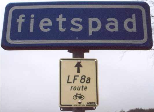 Routebordje LF 8a onder fietspadbord , eigen foto.